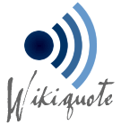 Ncwikiquote2